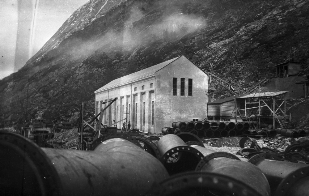 Flørli kraftverk. Fra anlegget.